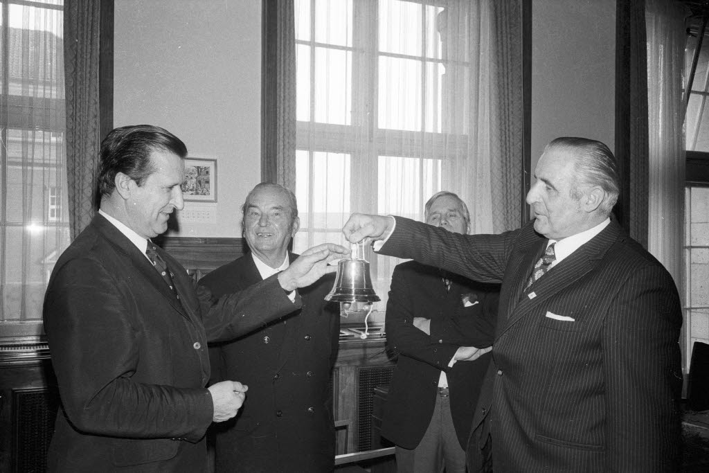 Die Vereinigung aller Olympiateilnehmer, Olympian International, ehrt die Stadt Kiel und alle Beteiligten für die Ausrichtung der Wettkämpfe. Vizepräsident Hans Fritsch (rechts) überreicht Oberbürgermeister Günther Bantzer stellvertretend eine Schiffsglocke. Hinten Segelsportler Dr. Hans Lubinus sen., der ebenfalls geehrt wurde, und rechts Hannes Leidemer, der Referent des Oberbürgermeisters.